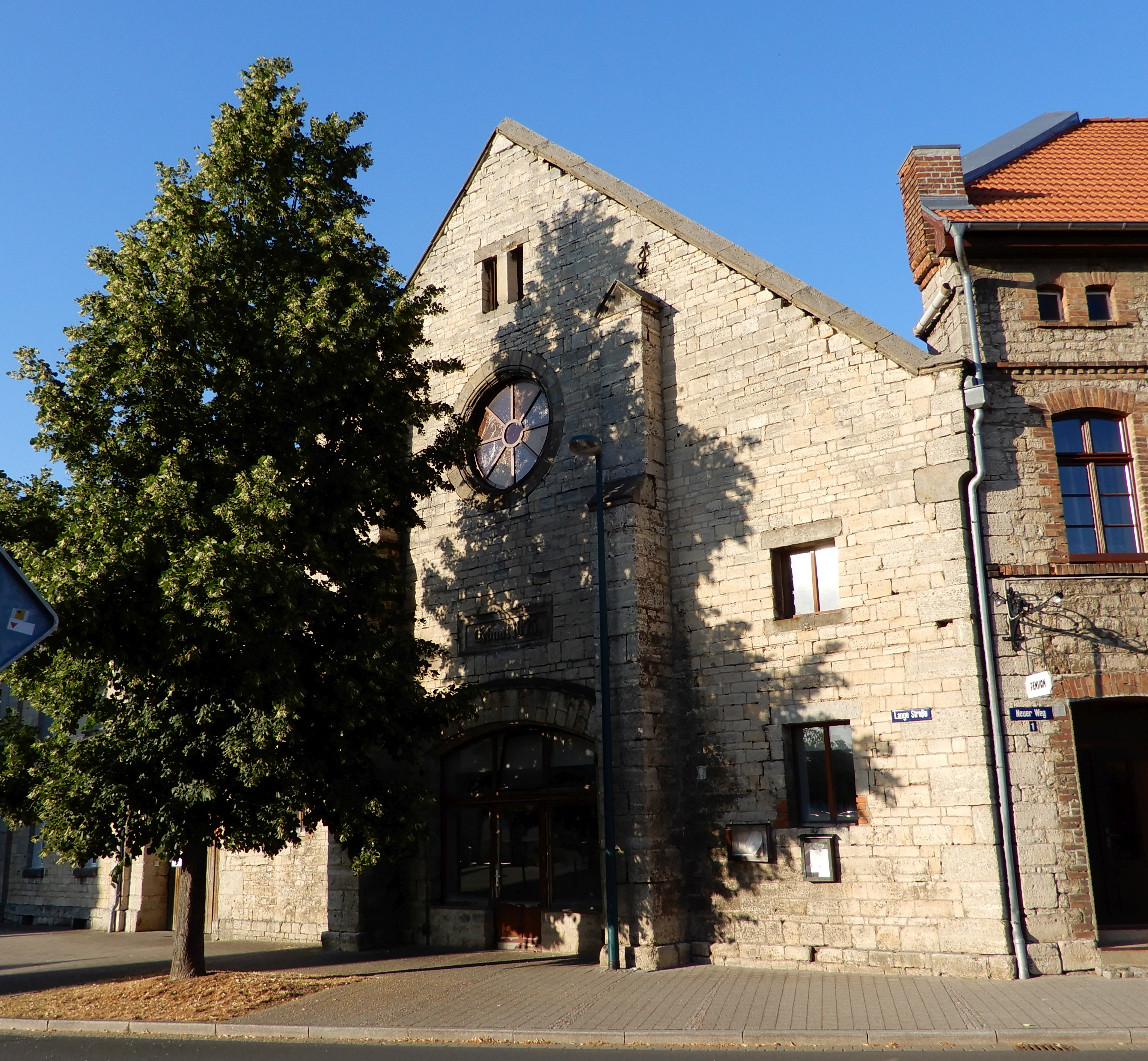 Gatersleben, Lange Straße 8